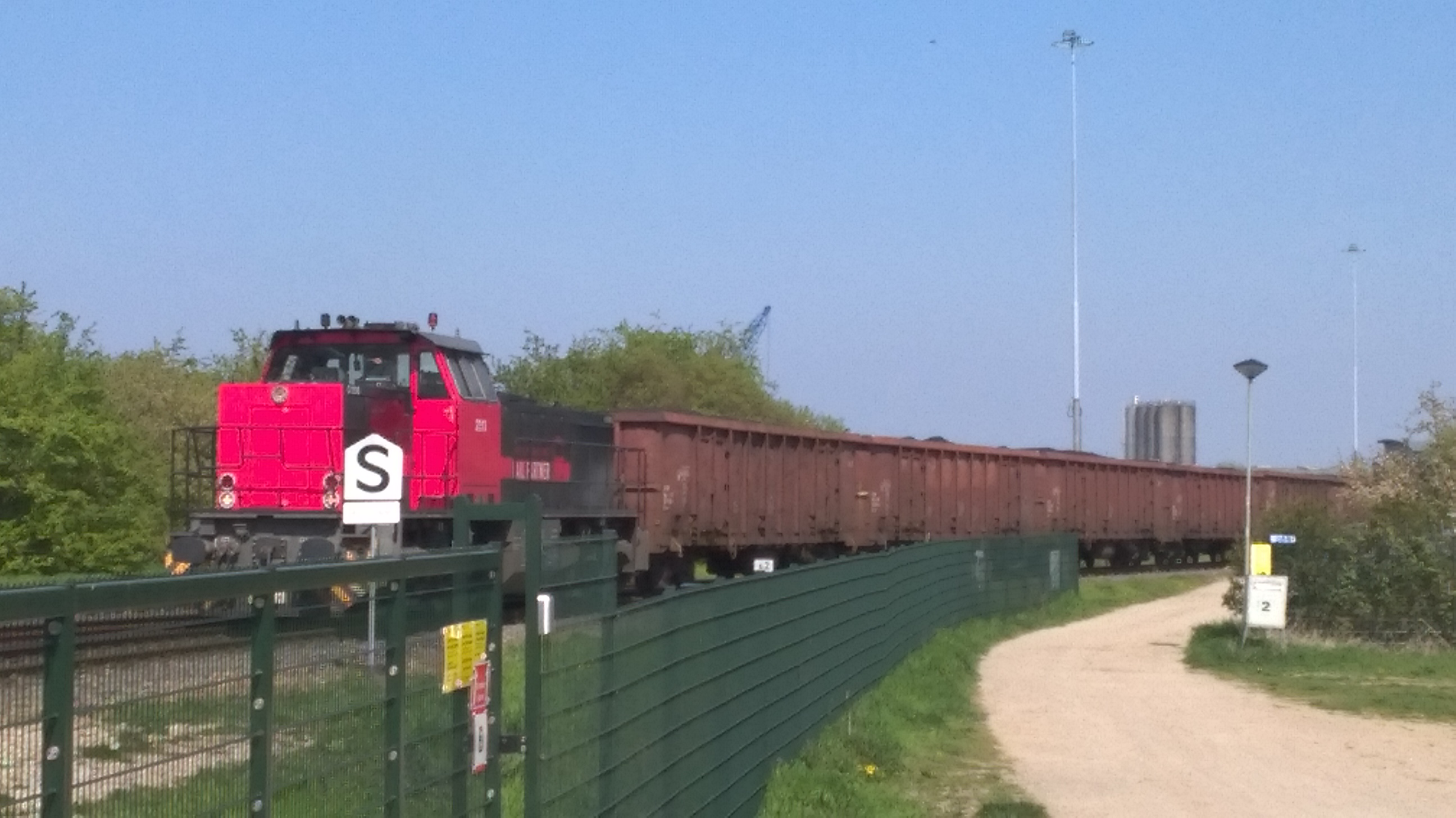 Diesellocomotief 2213 van Rail Partner staat aan de zuidkant van de NS-Laadhaven in Born te wachten om richting Sittard te rijden. Hij trekt wagons met steenkool, die even verder bij Enerco geladen is. Foto genomen vanaf Aan de laadhaven in noordelijke richting.